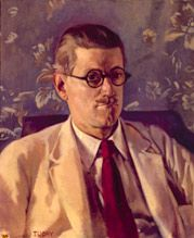 ג'יימס ג'וייס